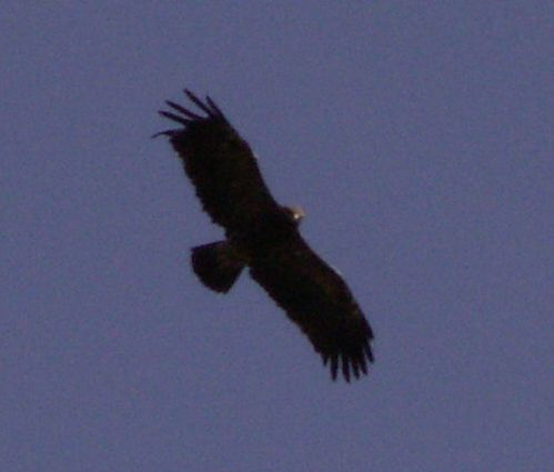 (possibly a) Aquila pomarina